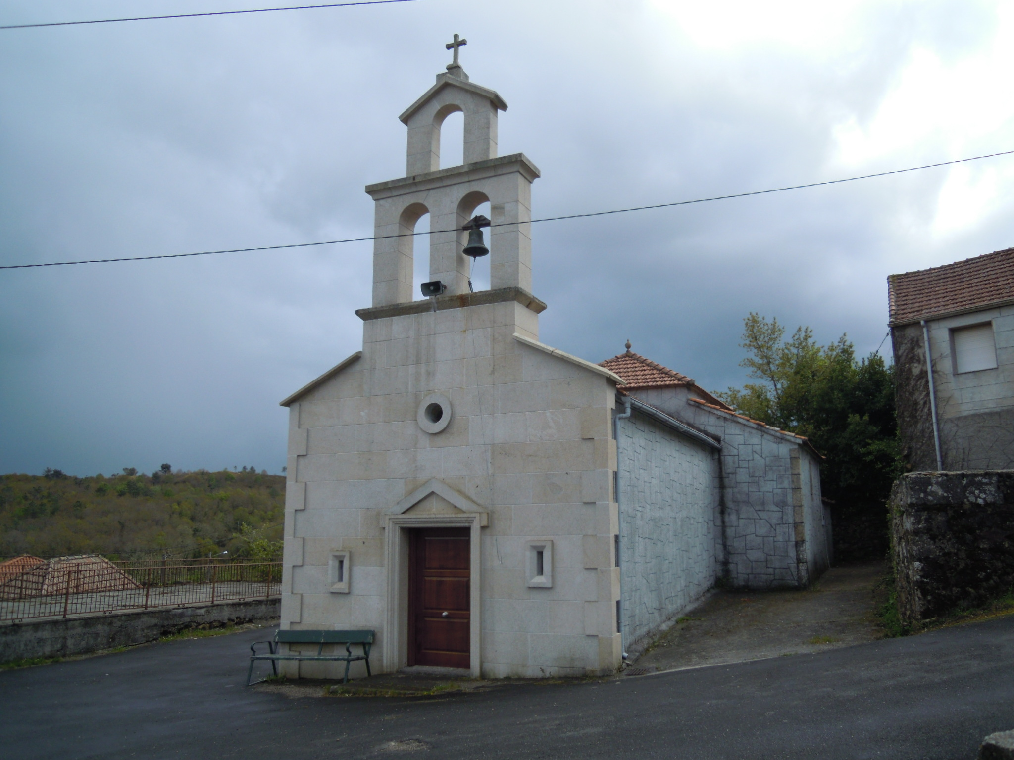 Capela de San Xoán en (Rubillón, Baíste, Avión).